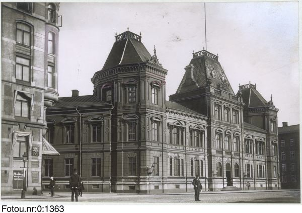 Posthuset vid Packhusplatsen 3 i Göteborg, 1873-1925. Det gamla posthuset revs år 1942. Carl Rudolf A:son Fredbergs samling.